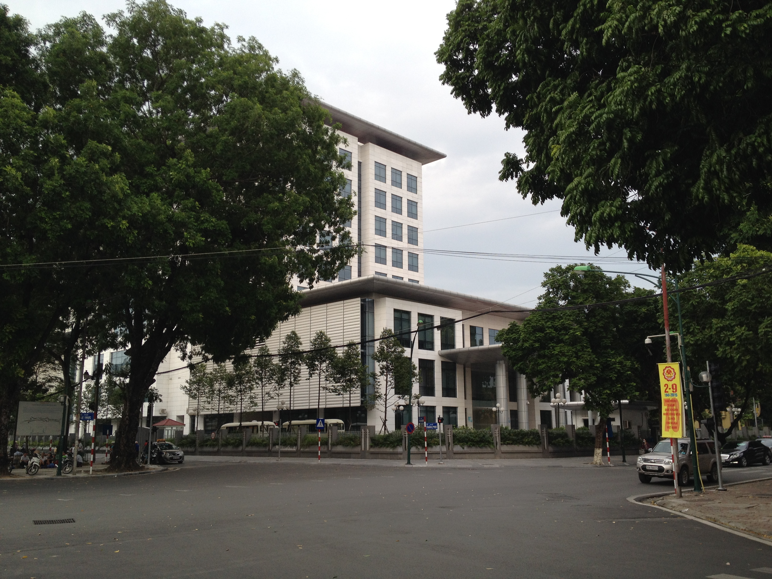 Hà Nội, Việt Nam.